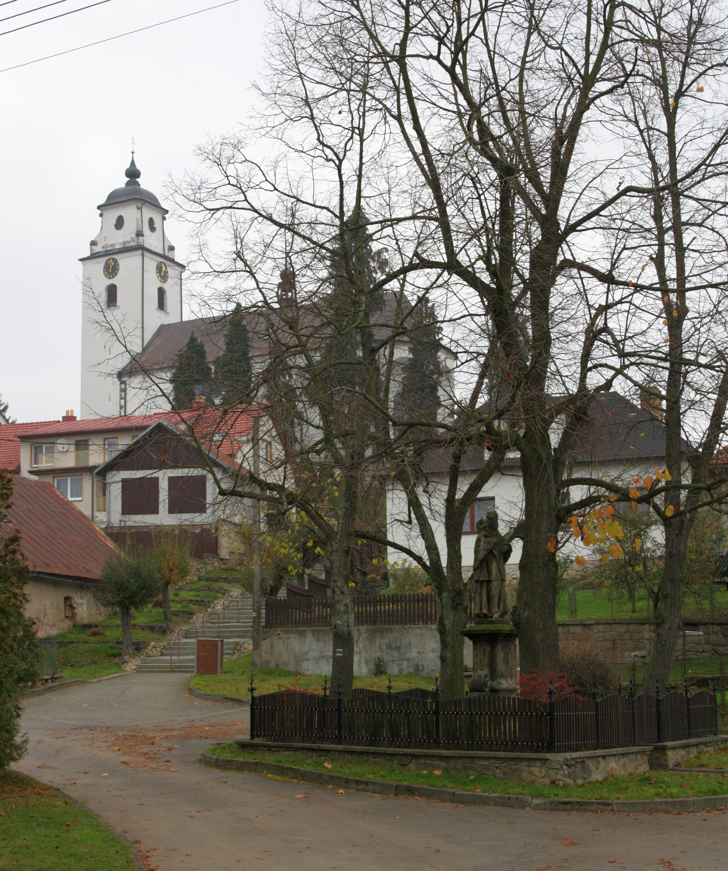 Netín - náves se sochou sv Jana Nepomuckého